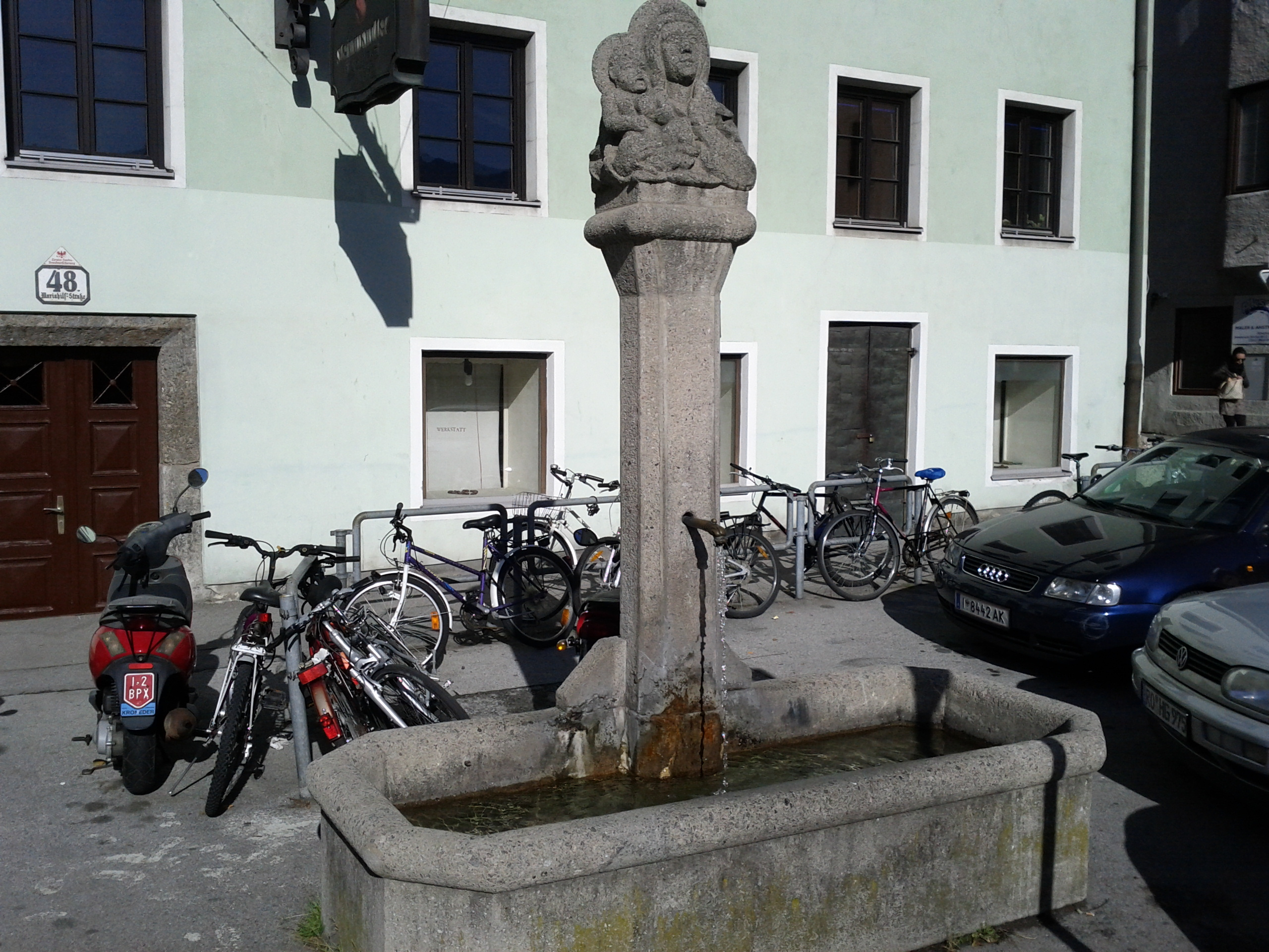 Brunnen: Maria-Hilfstraße 48 in Innsbruck This media shows the remarkable cultural object in the Austrian state of Tyrol listed by the Tyrolean Art Cadastre with the ID 116109. (on tirisMaps, pdf, more images on Commons, Wikidata)